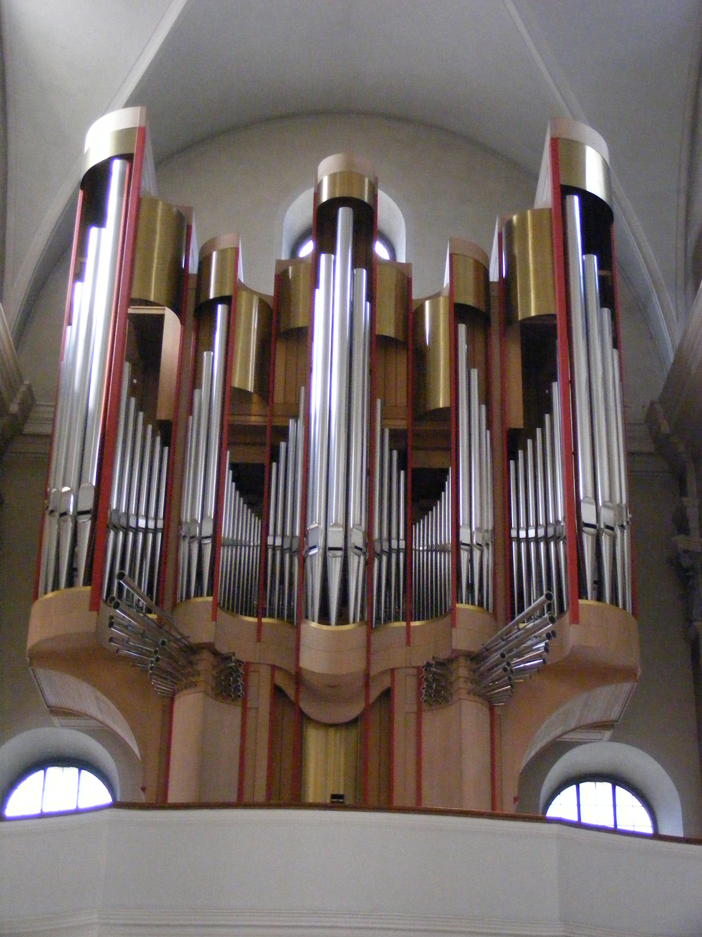 Würzburg - Augustinerkirche innen (Orgel).